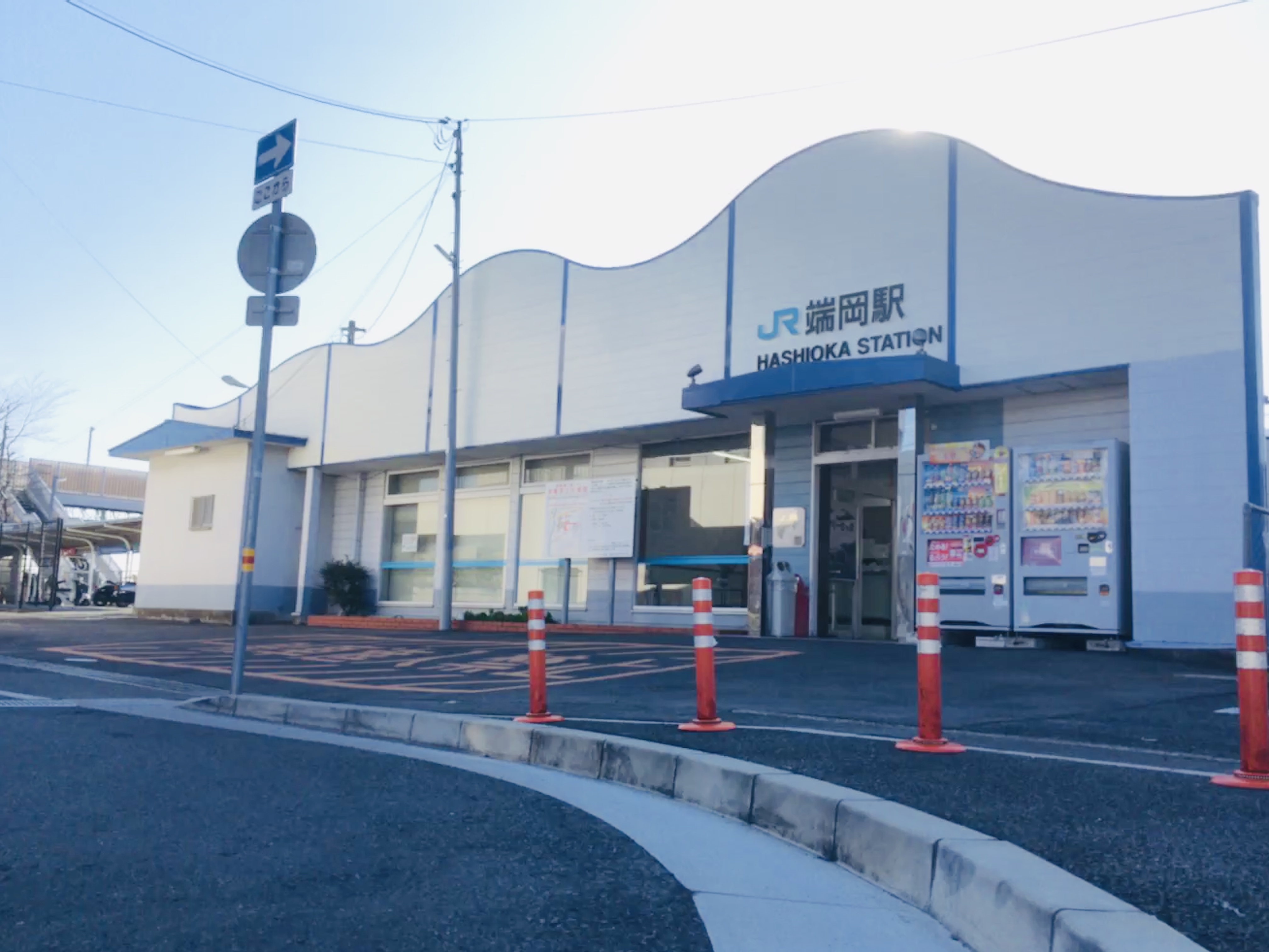 jr四国端岡駅 駅舎